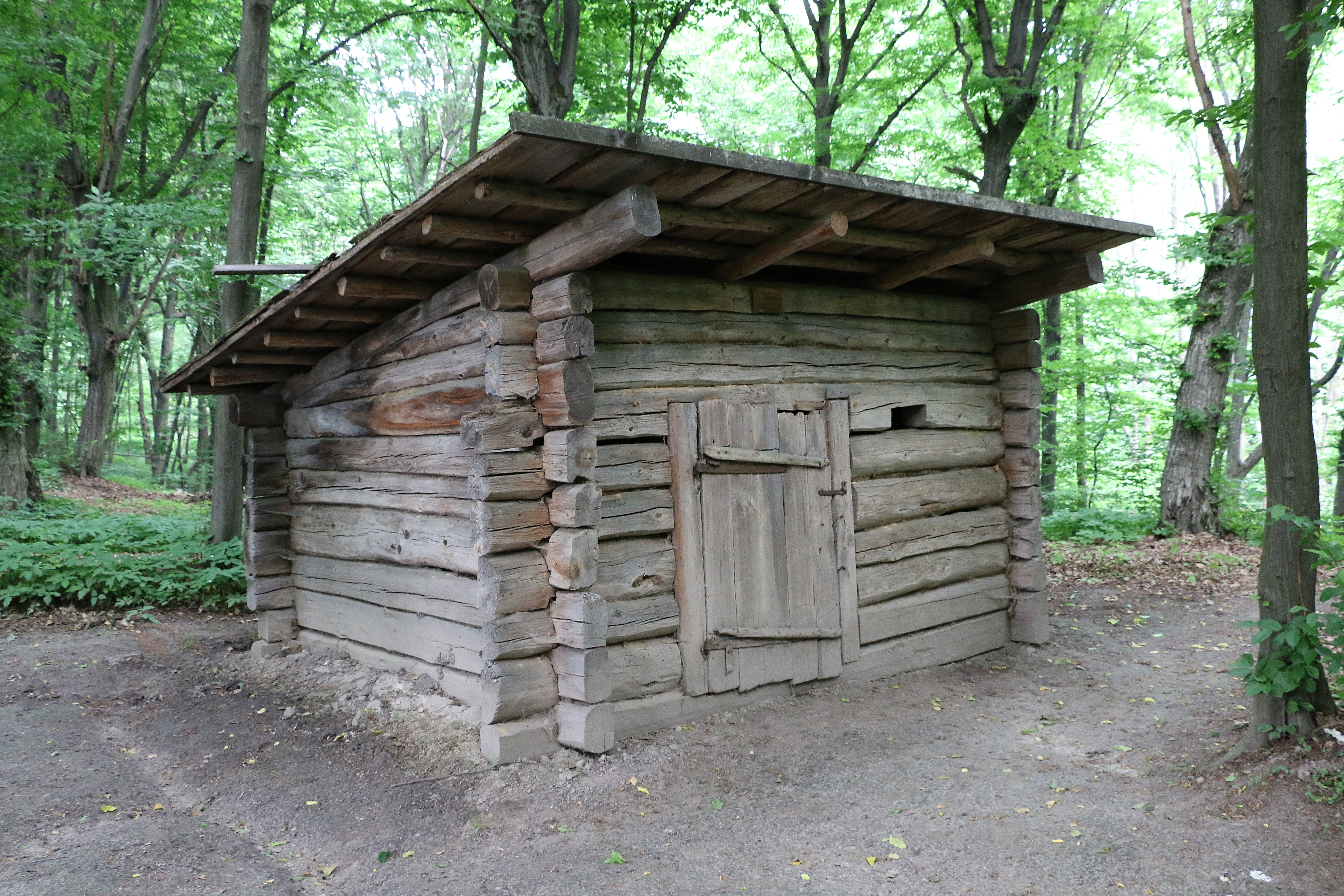 Хлівчук з села Грабунь Рокитнівського району Рівненської області, Київ, Пирогів